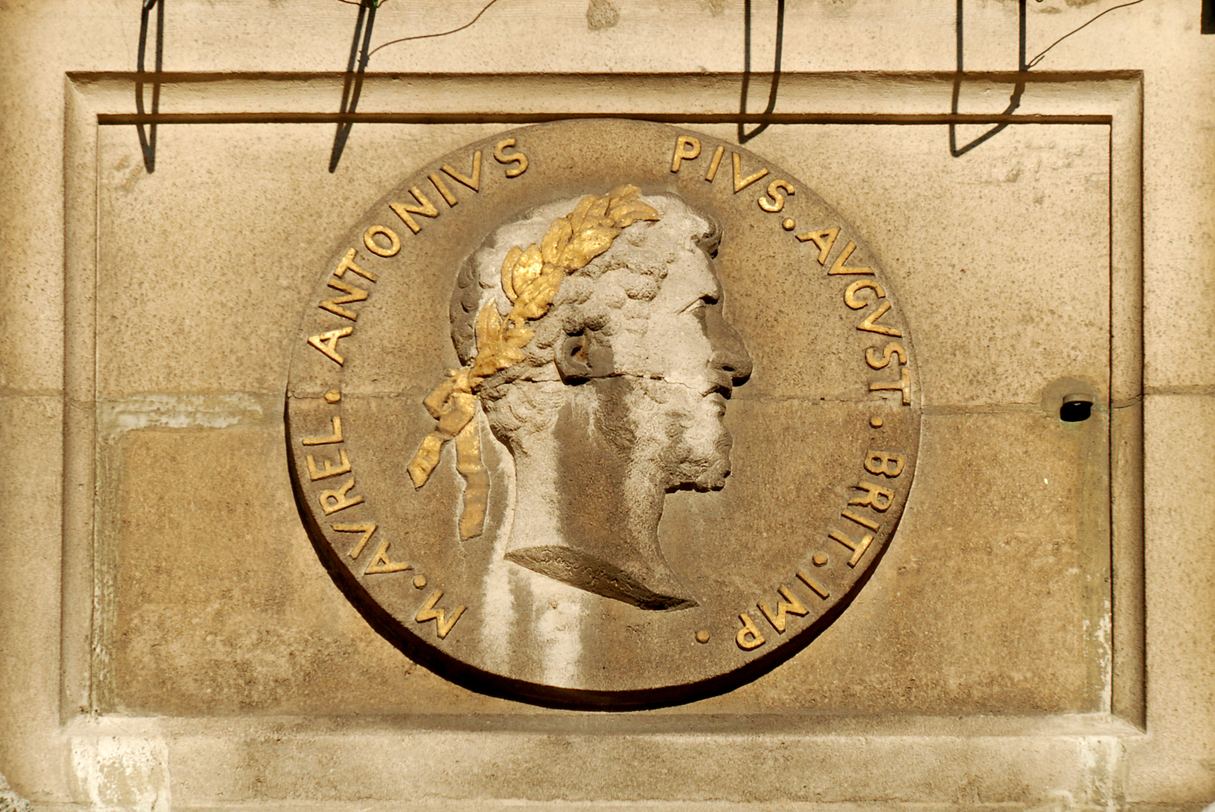 Belgique - Bruxelles - Grand-Place - Maison du Roi d'Espagne